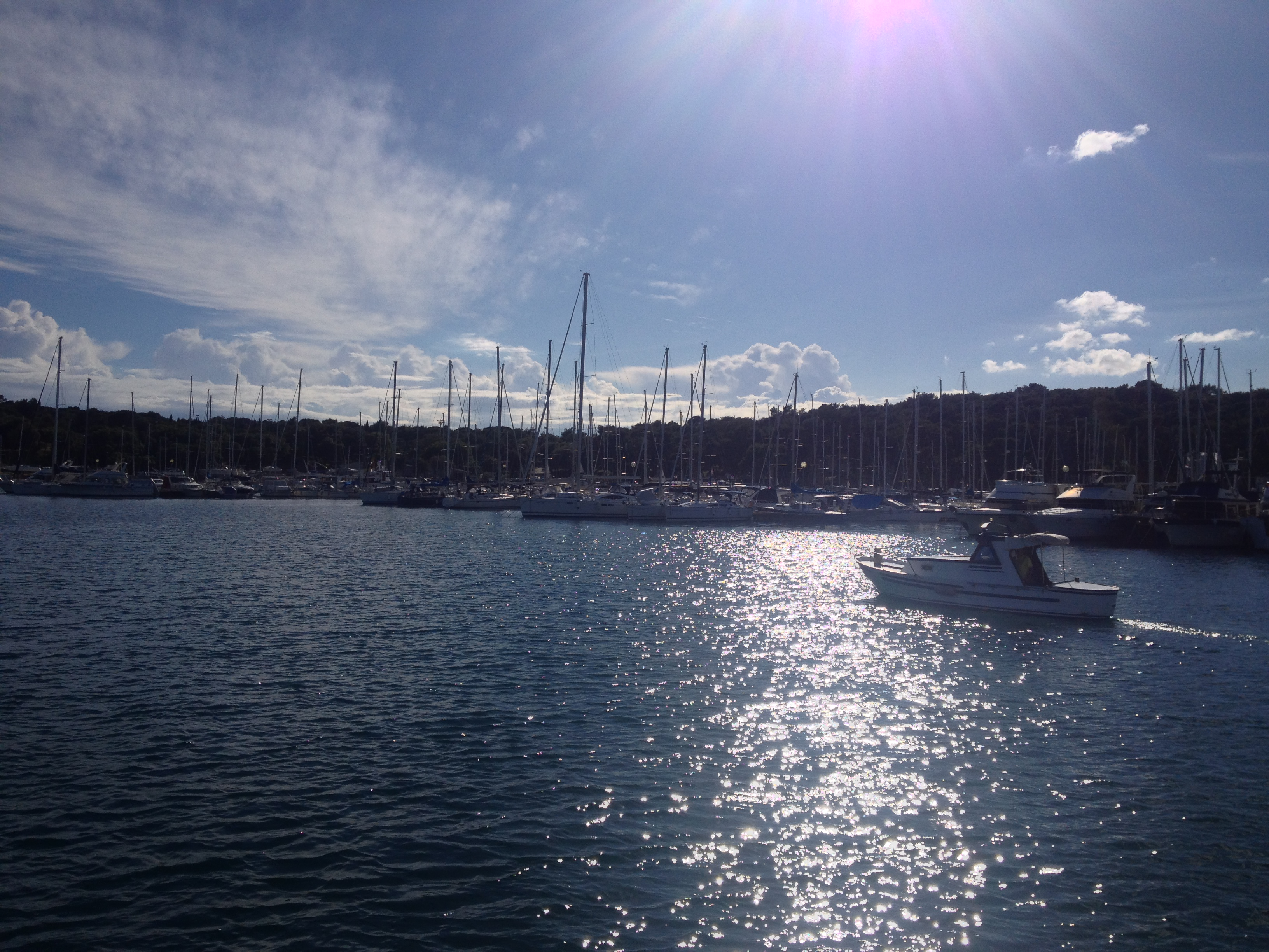 Valsabionska ul. 34, 52100, Pješčana Uvala, Croatia